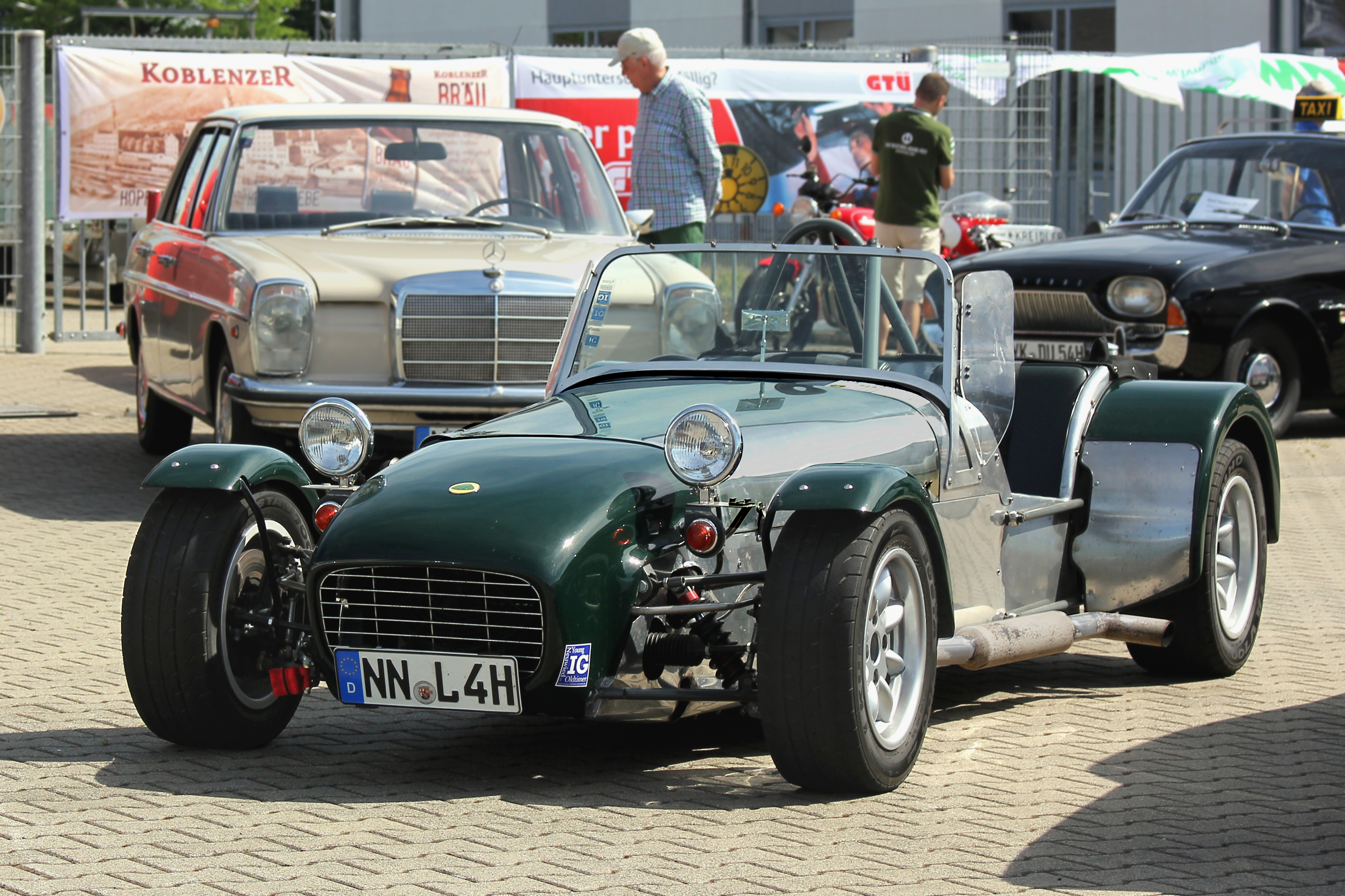 Lotus Seven 3 S von 1969, Version mit Twin-Cam-Motor, ca. 1600 cm³, beim Oldtimertreffen des AC Mülheim-Kärlich (Kennzeichen verändert)